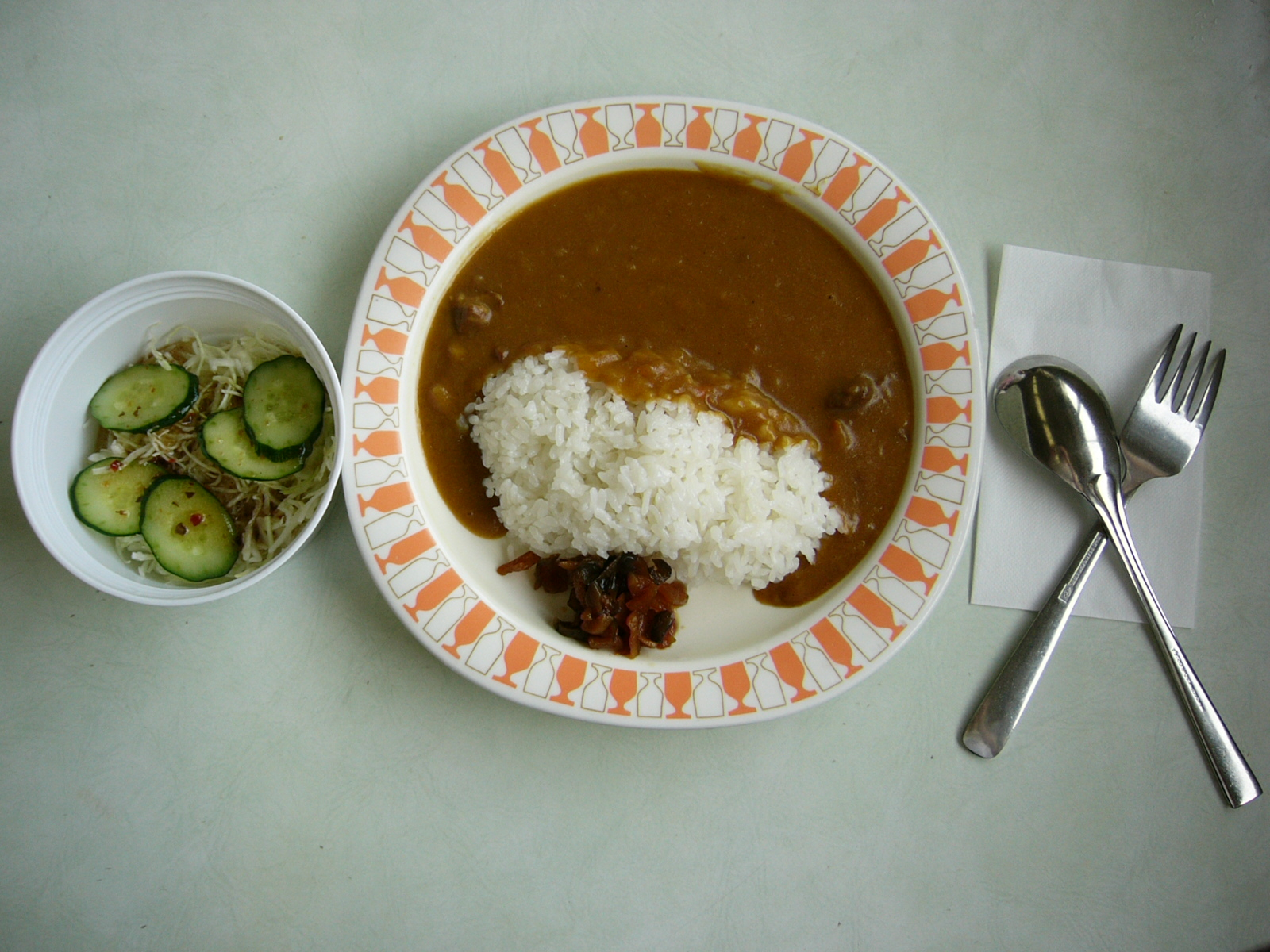 サラダ付き